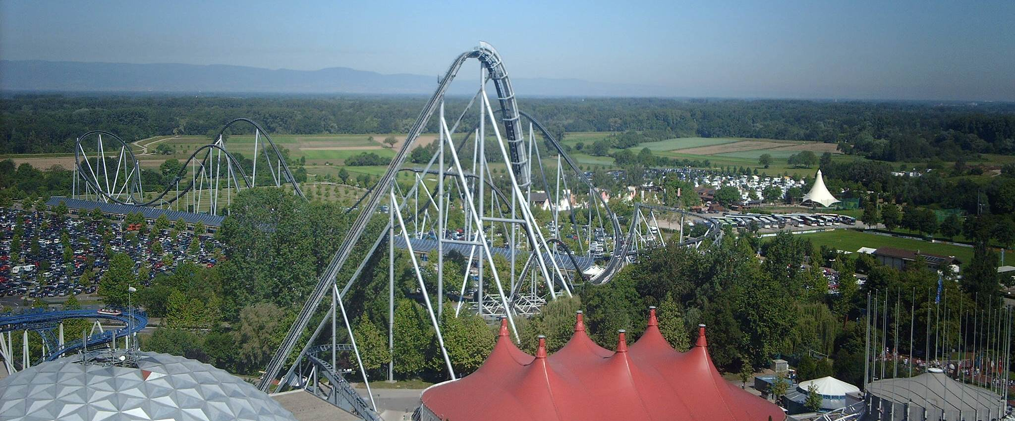 Vue panoramique du SilverStar à EuropaPark.